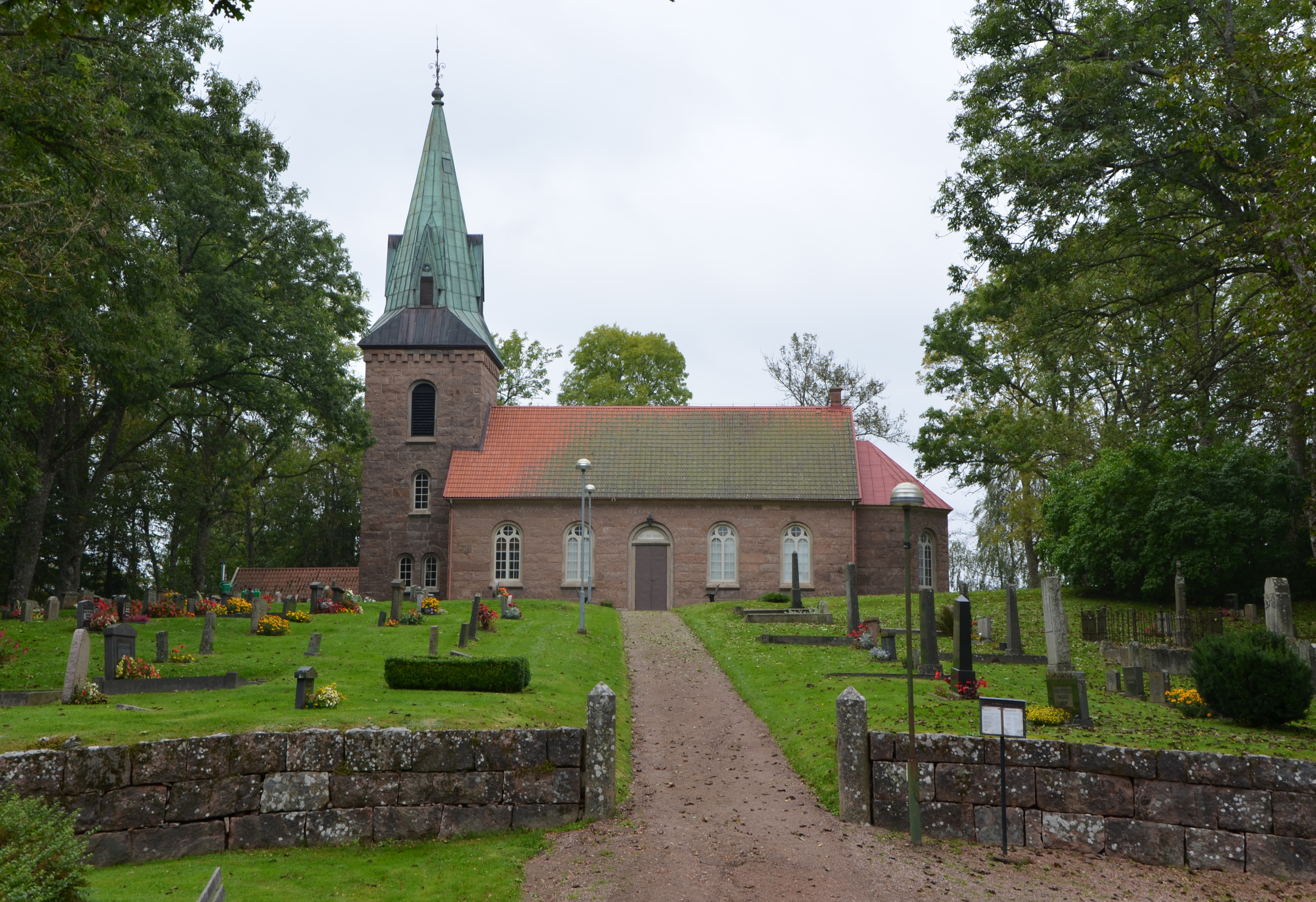 Alboga Kirche